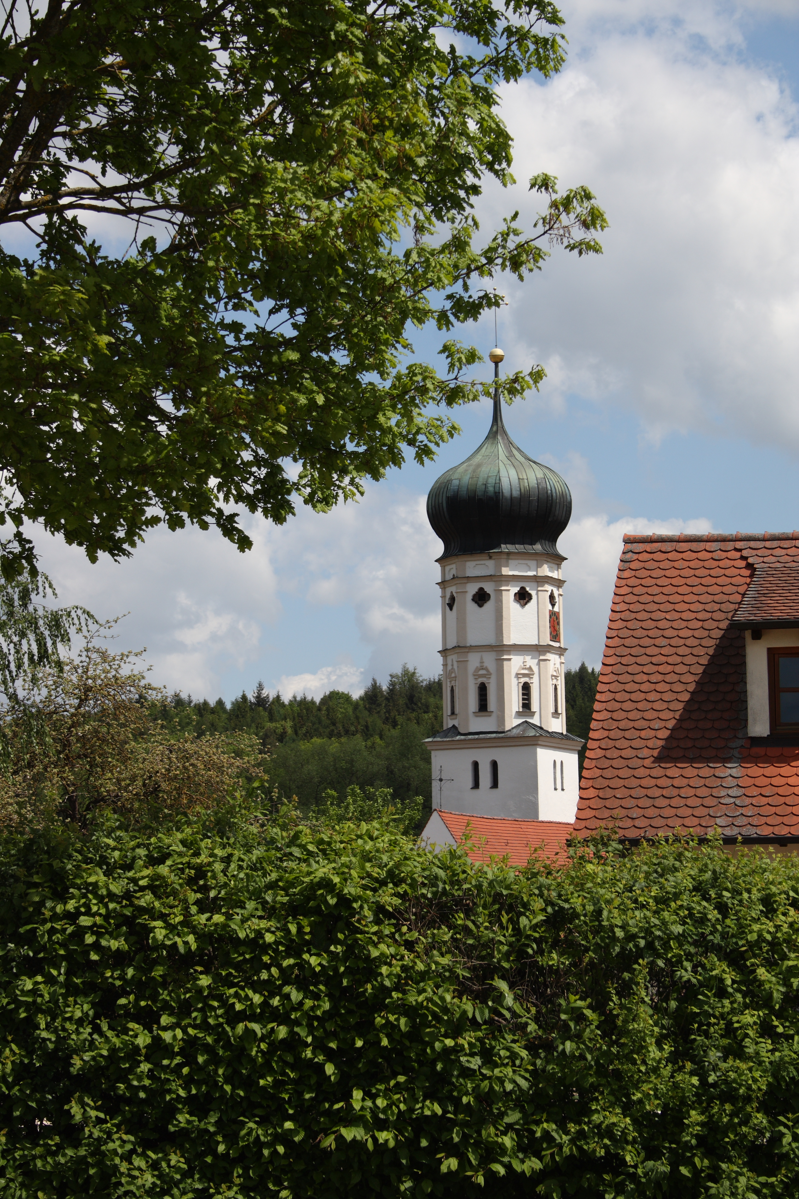 Katholische Wallfahrtskirche Mariä Himmelfahrt in Buggenhofen, einem Ortsteil von Bissingen im Landkreis Dillingen an der Donau (Bayern), Zwiebelturm